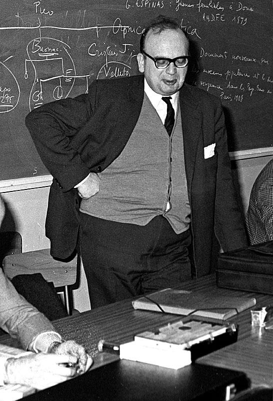 Photographie du professeur Raymond Chevallier, à son séminaire de l'Ecole des hautes études en sciences sociales de Paris.